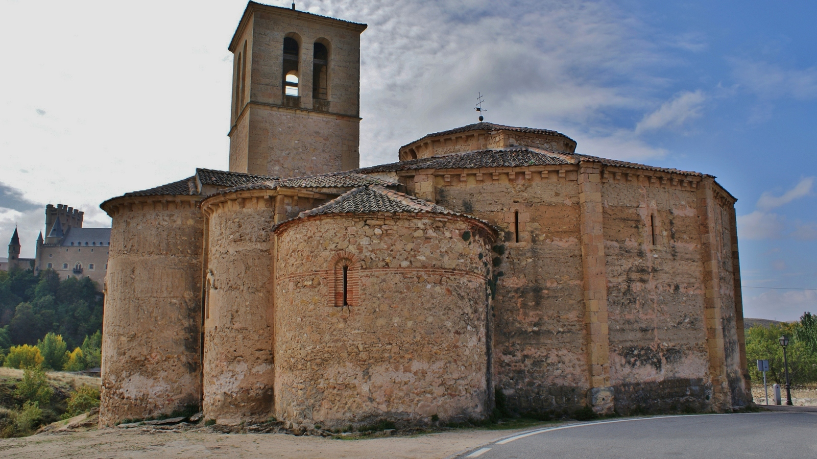 Iglesia de la Vera Cruz, Segovia, Castilla y León. En sus comienzos como del Santo Sepulcro. De principios del siglo XIII, origen incierto Templario o de la Orden del Santo Sepulcro, en la actualidad pertenece a la Orden de Malta.